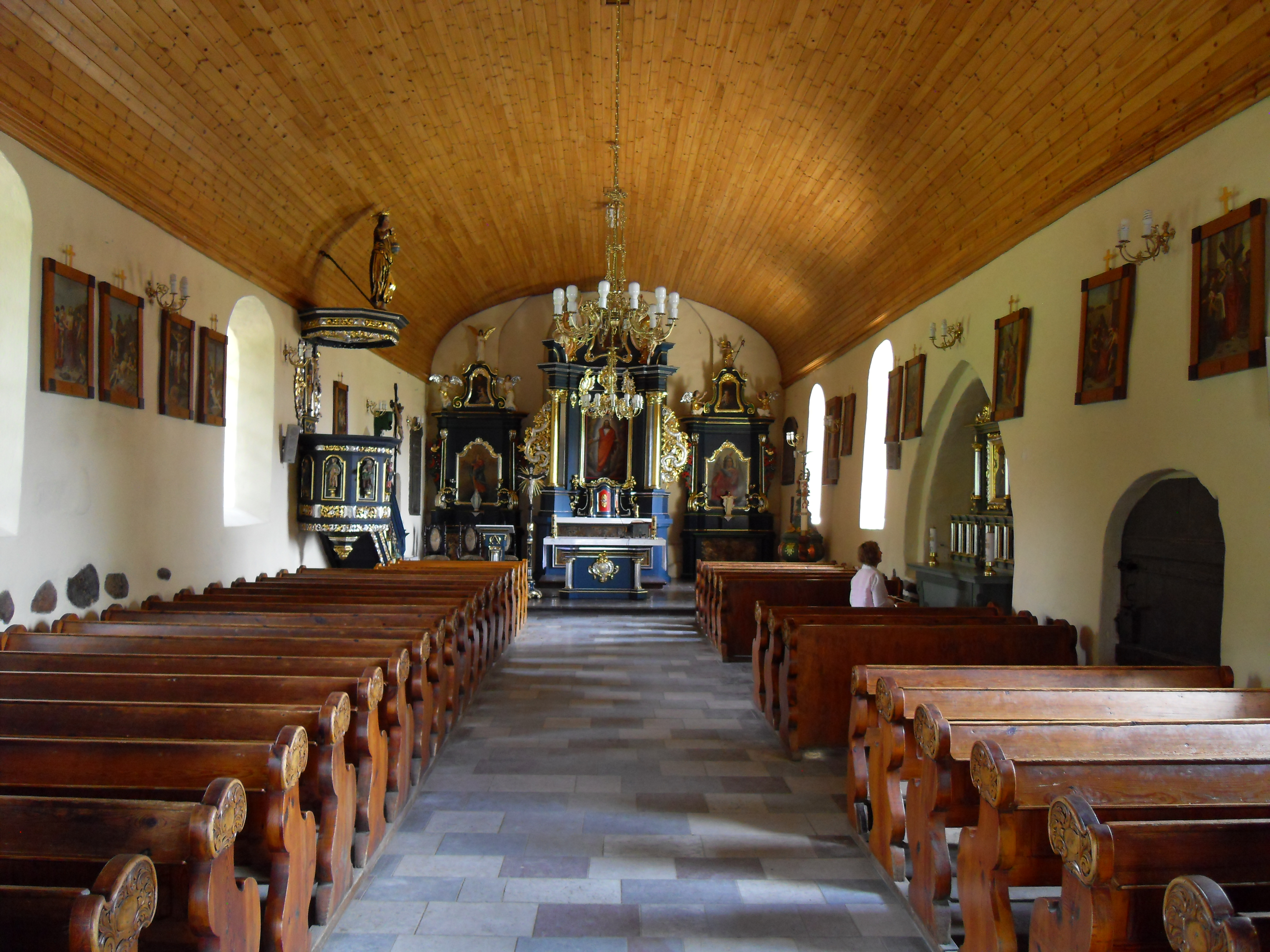 Gdańsk Matarnia, kościół świętego Walentego.